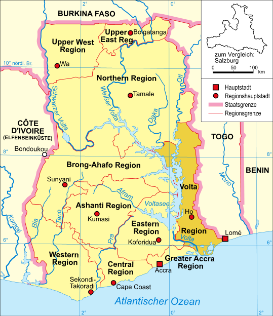 Politische Karte Ghanas (Volta Region hervorgehoben) Kategorie:Datei:Ghana